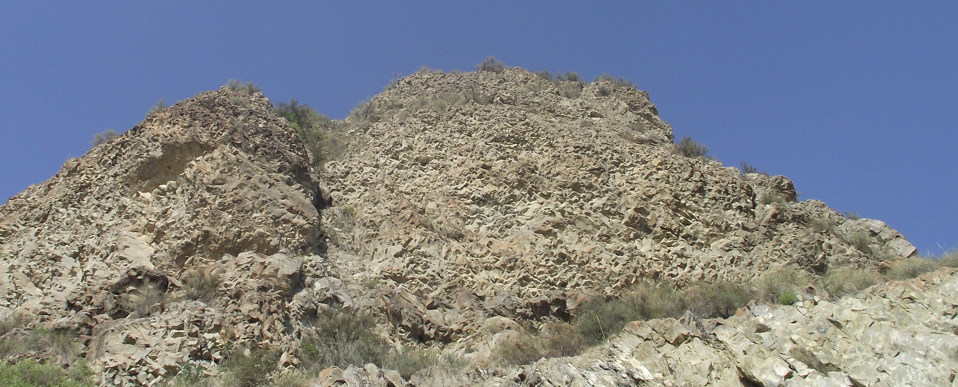 Detalle del domo volcánico del Cabezo Negro de Zeneta (Murcia)